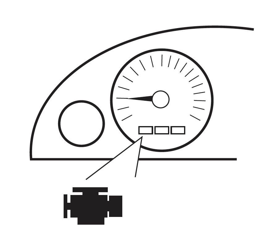 エンジン警告灯